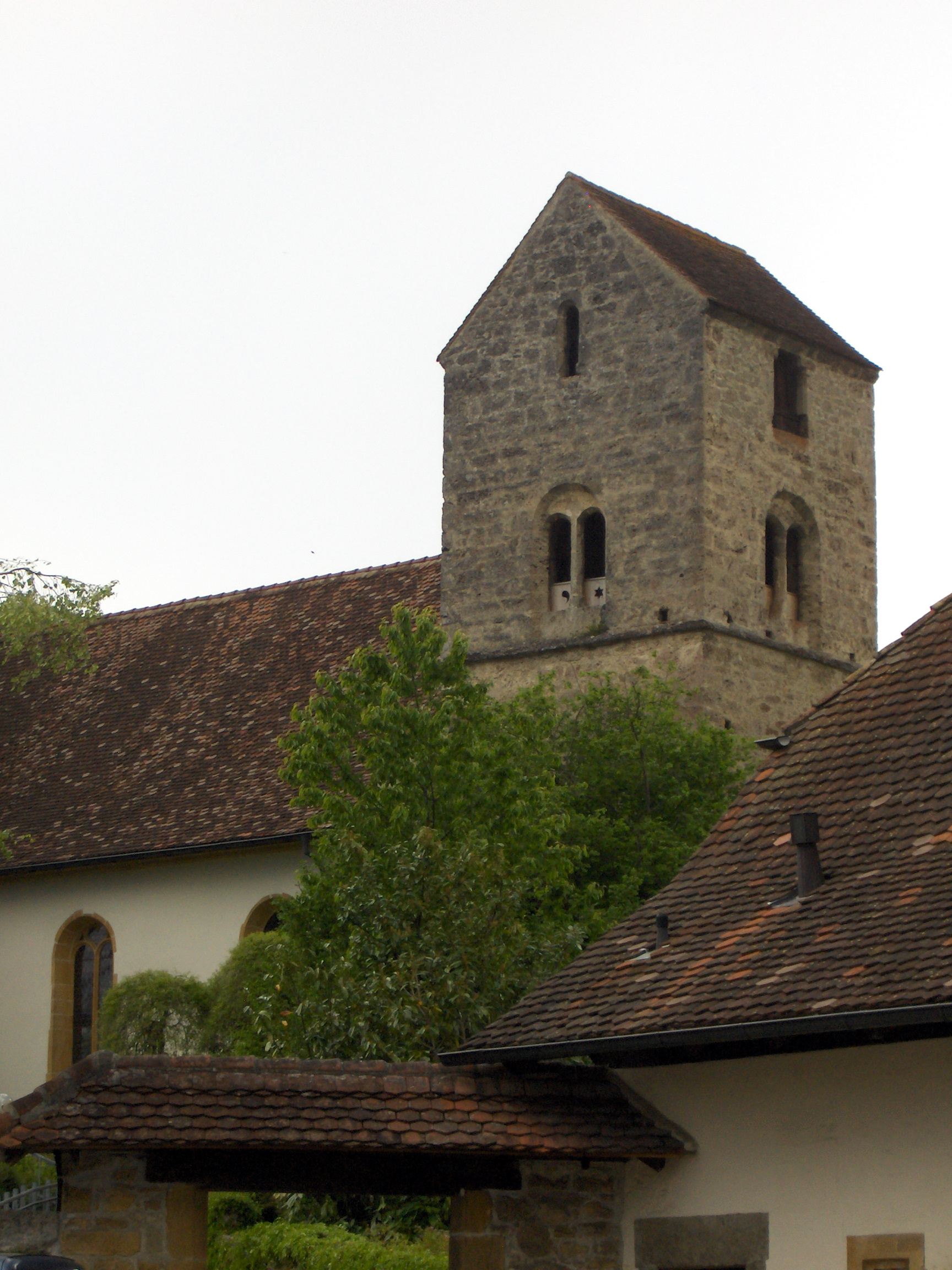 Die Ulrich-Kirche in Erlach (BE)